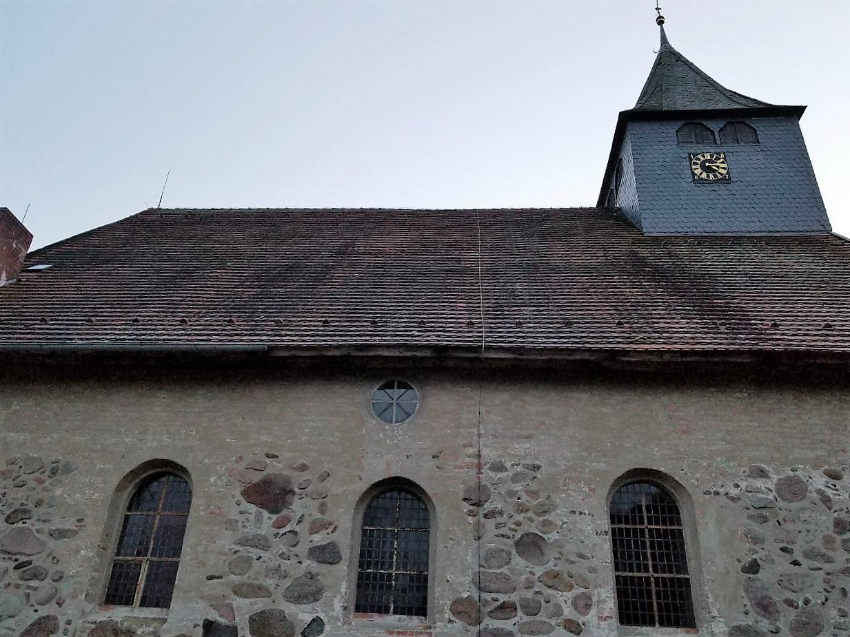 Feldsteinkirche Trebel. Nordseite